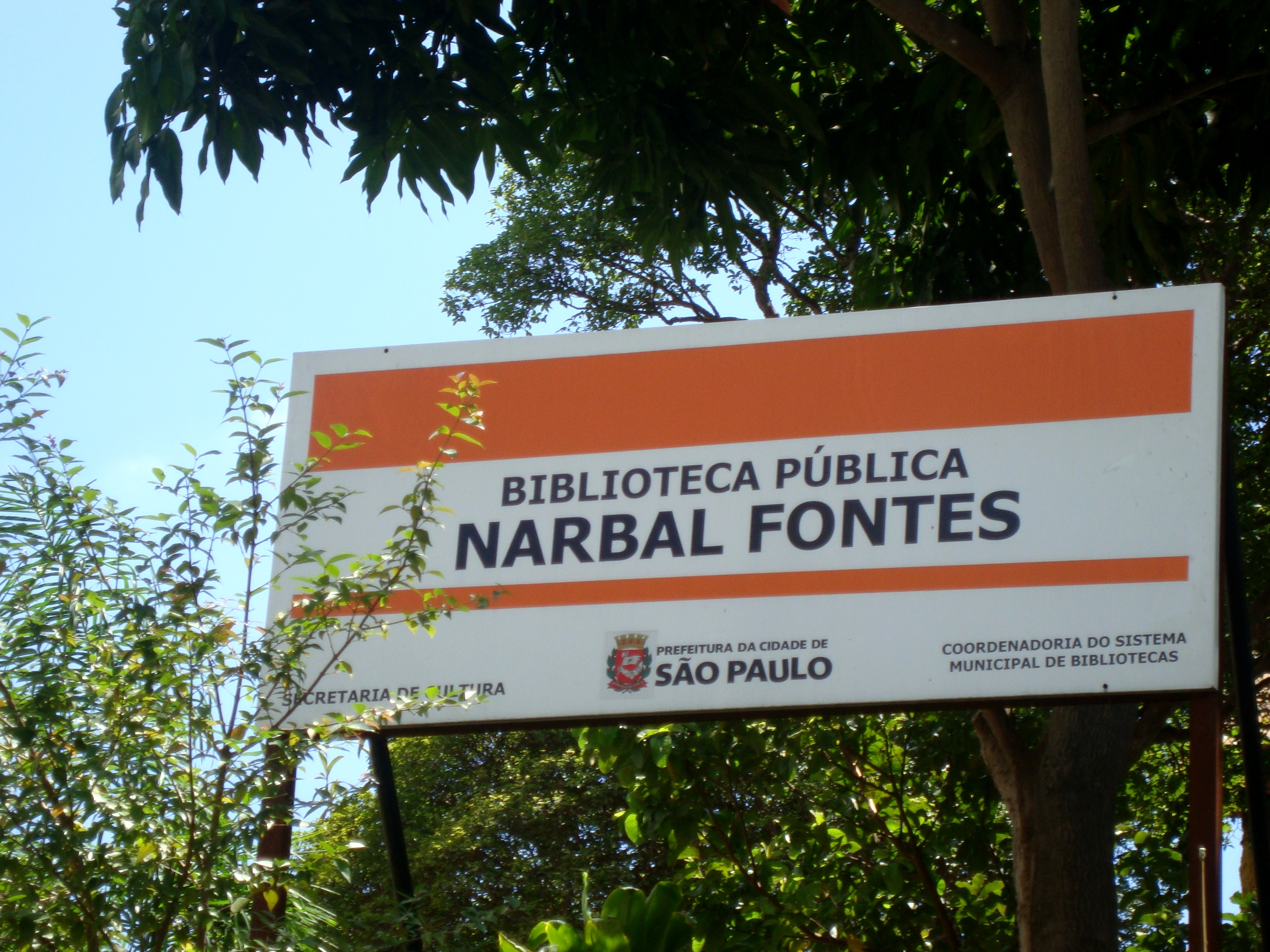 Placa de identificação da Biblioteca Narbal Fontes no Alto de Santana, região da cidade de São Paulo.